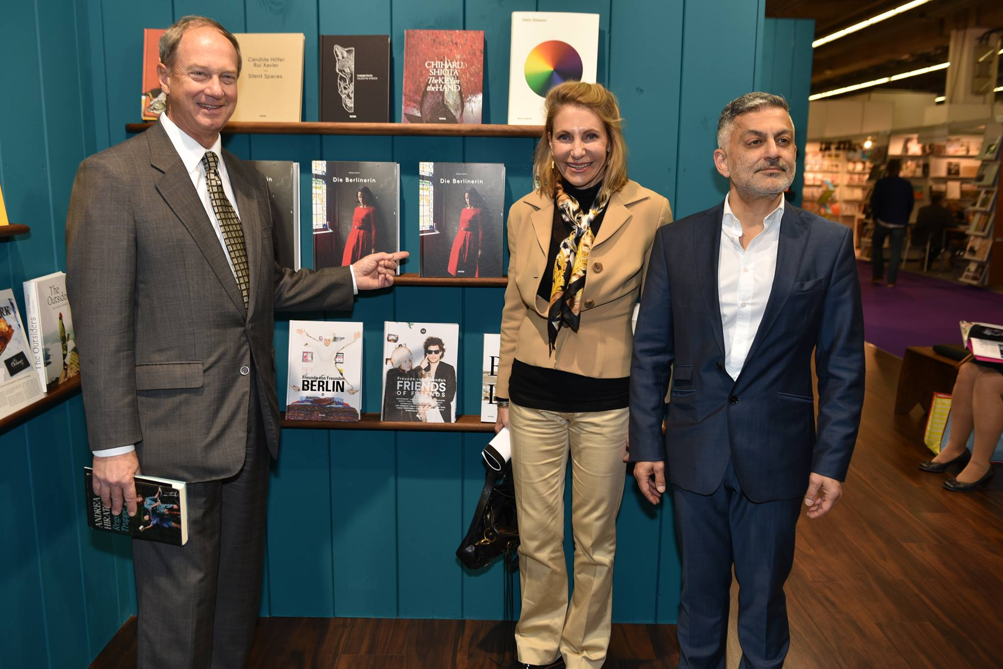 L to R: John B. Emerson, Kimberly Emerson und Ashkan Sahihi auf der Frankfurter Buchmesse 2015. Mr. Emerson zeigt auf das Buch "Die Berlinerin" von Ashkan Sahihi, das auch ein Portrait seiner Frau enthält.